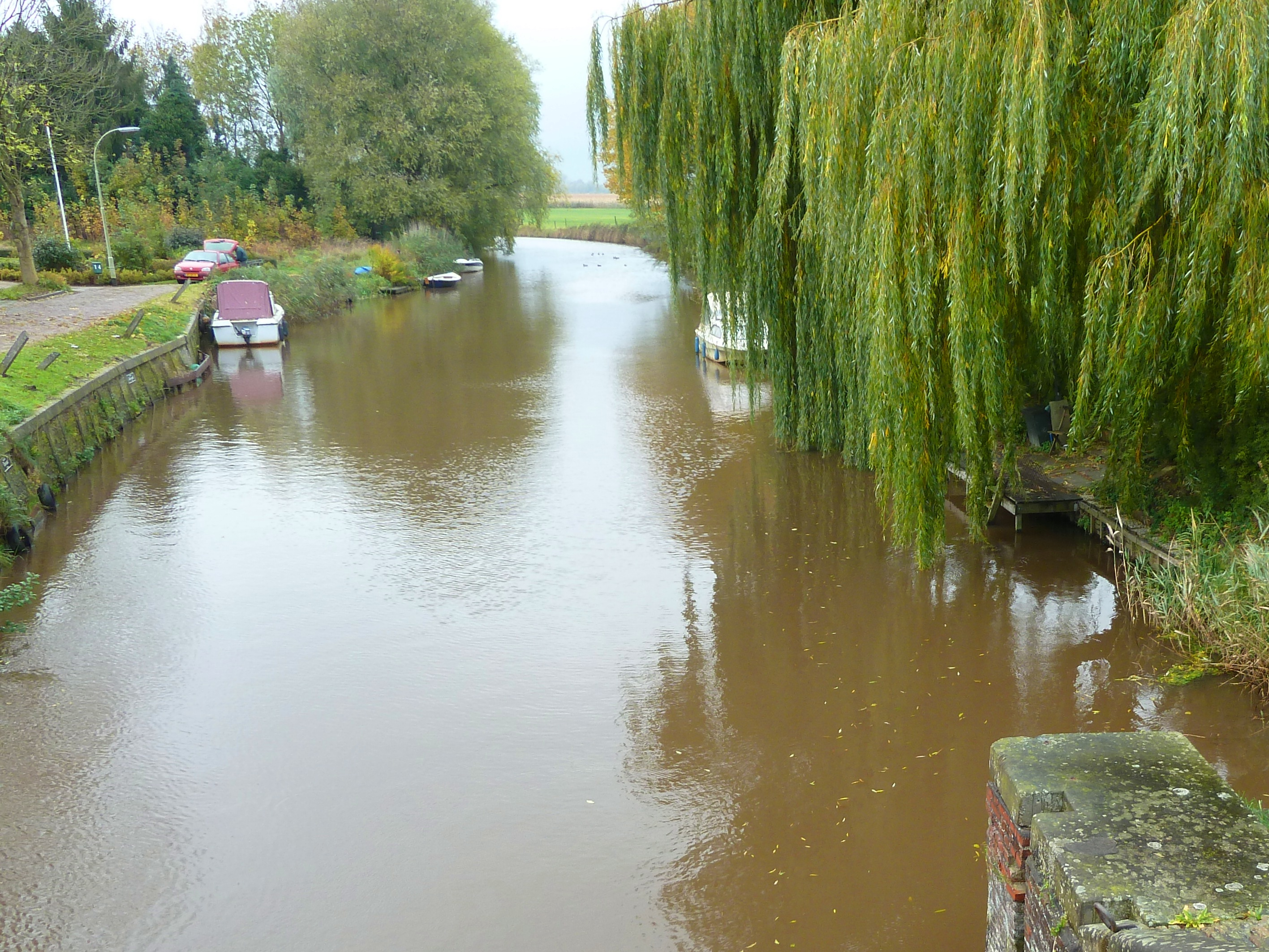 Gezicht op de Kromme Raken vanaf de Schouwerzijl in de richting van het noordwesten.